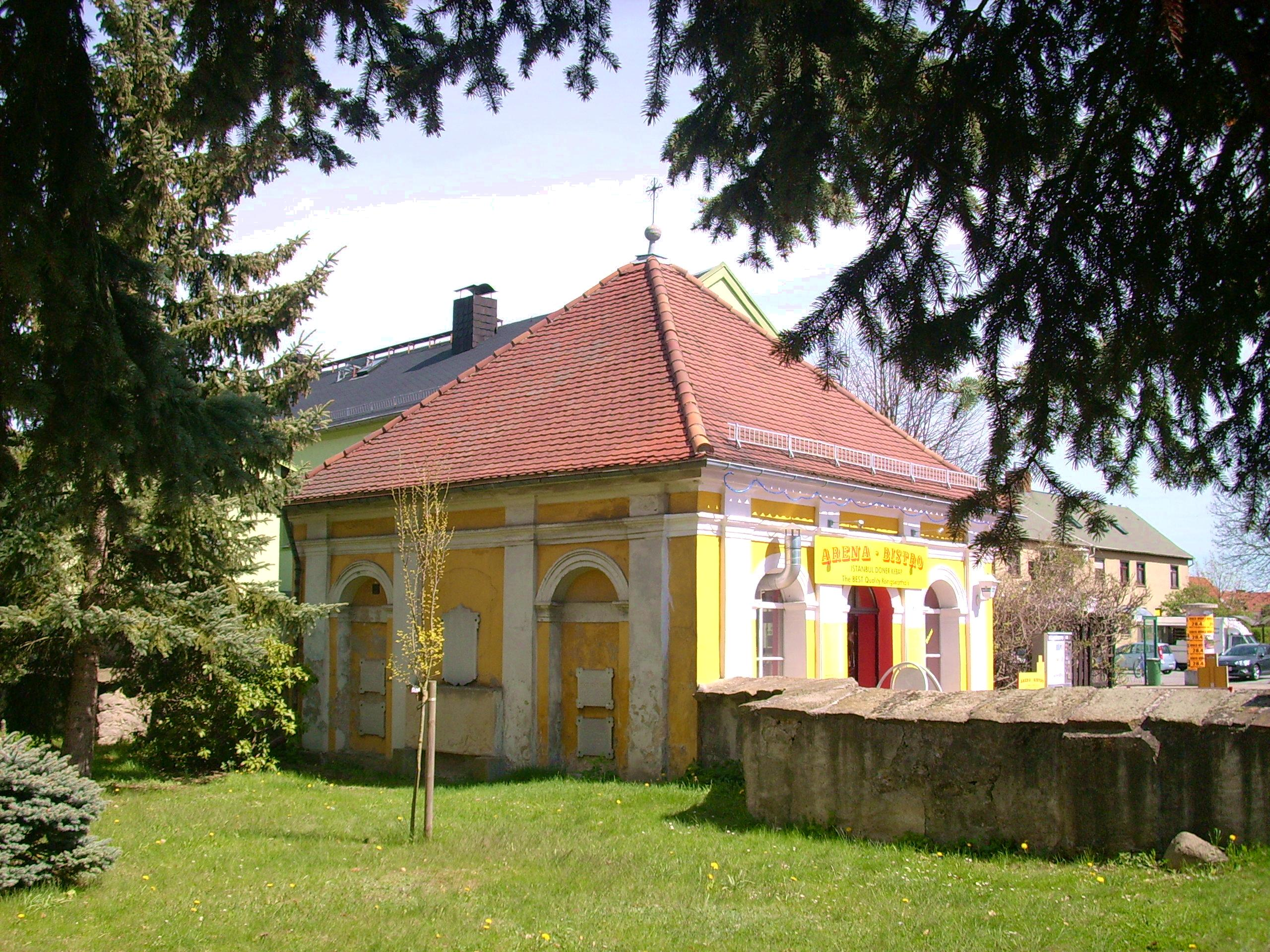 Dallwitzsche Gruft in Königswartha